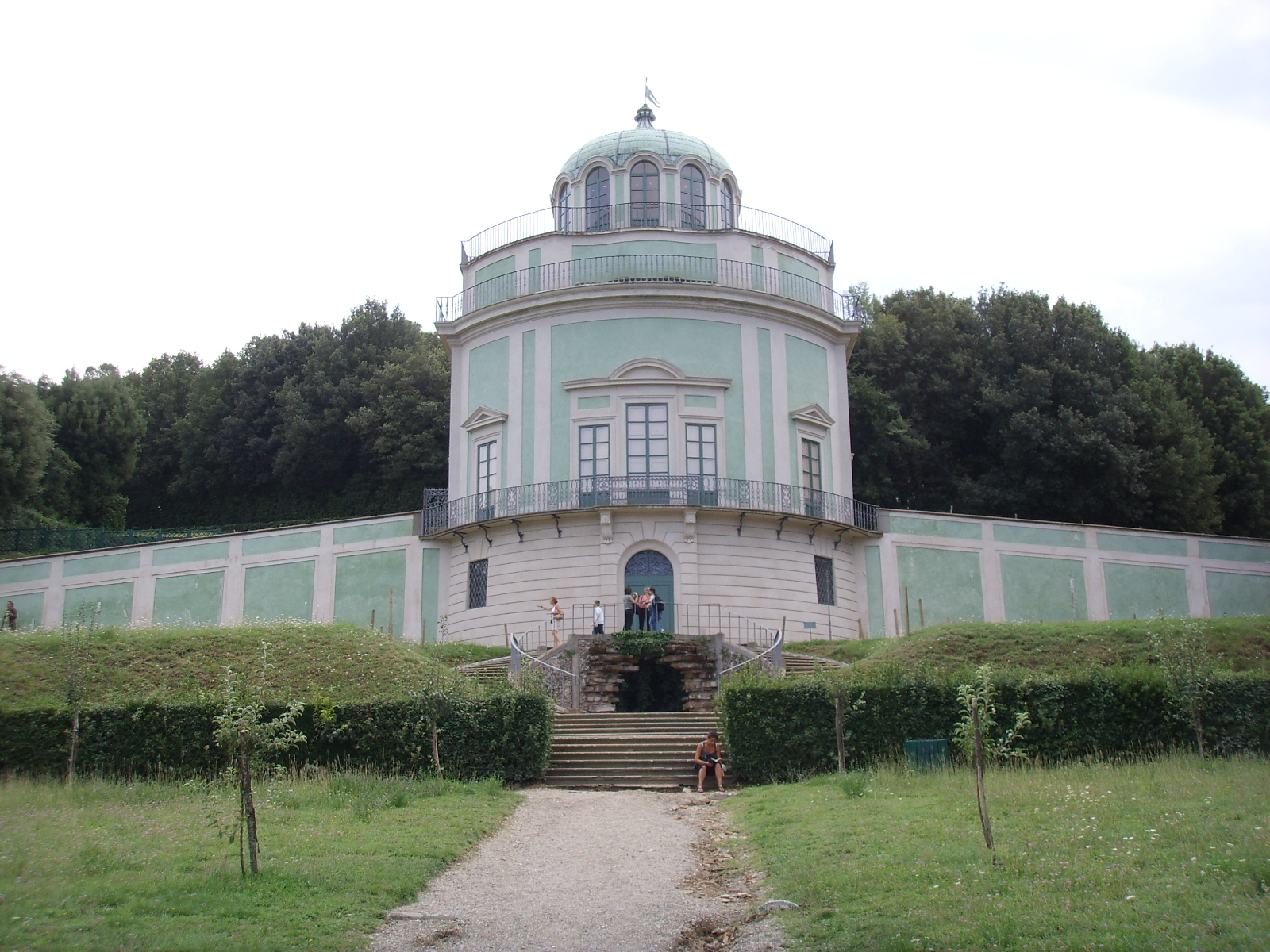 Boboli, kafeehaus